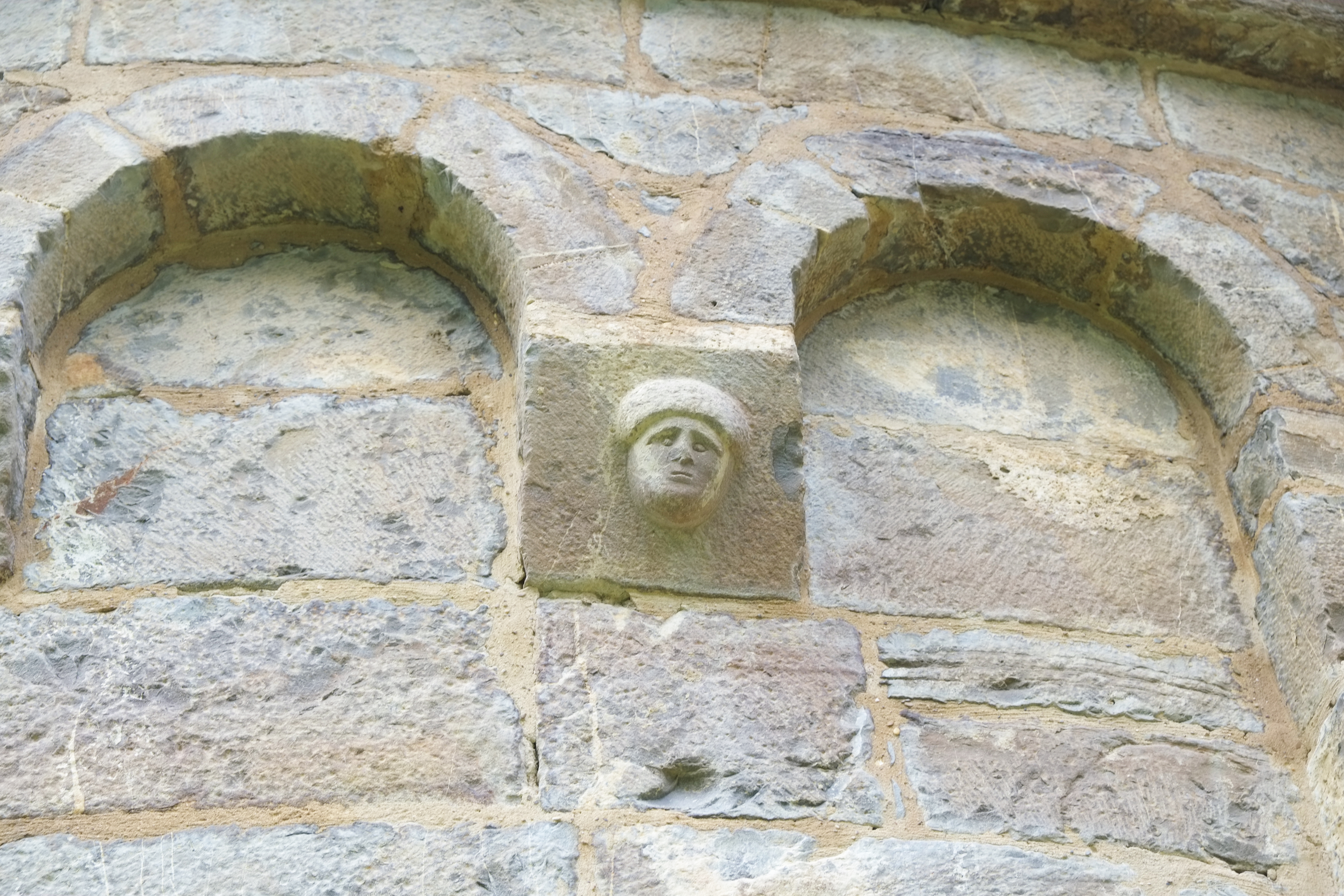 Ehemalige Klosterkirche San Adrián de Sasabe in Borau in der Provinz Huesca in Aragonien (Spanien)